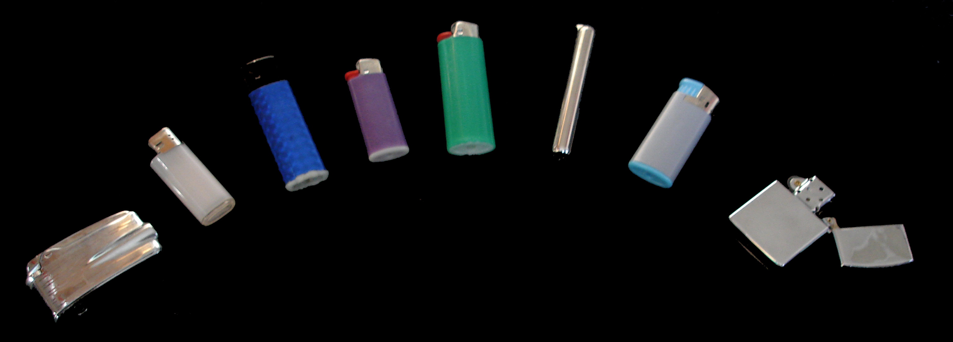 Lighters Briquets